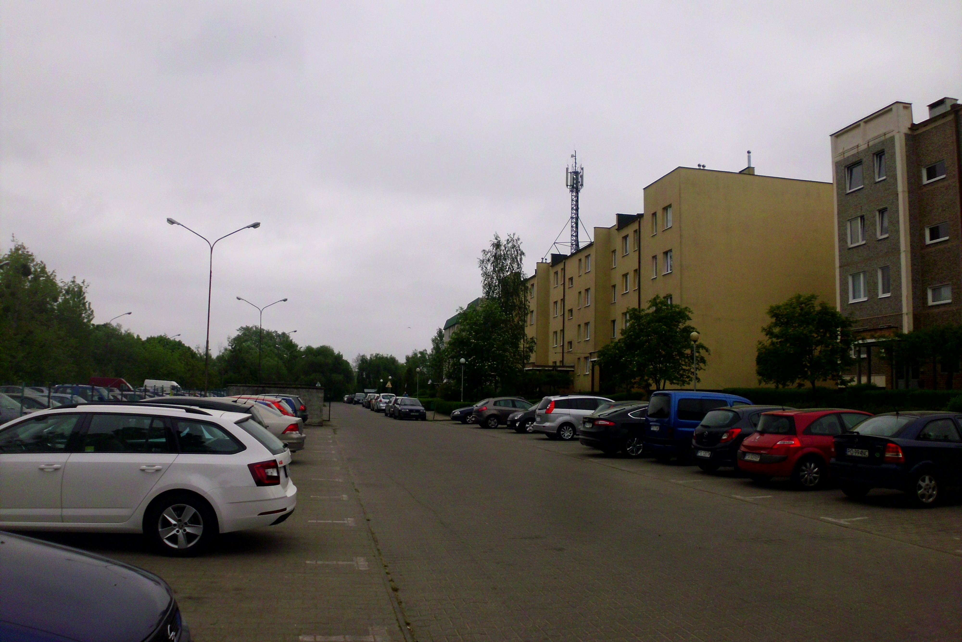 2017-05-20 Os. Lotnictwa Polskiego